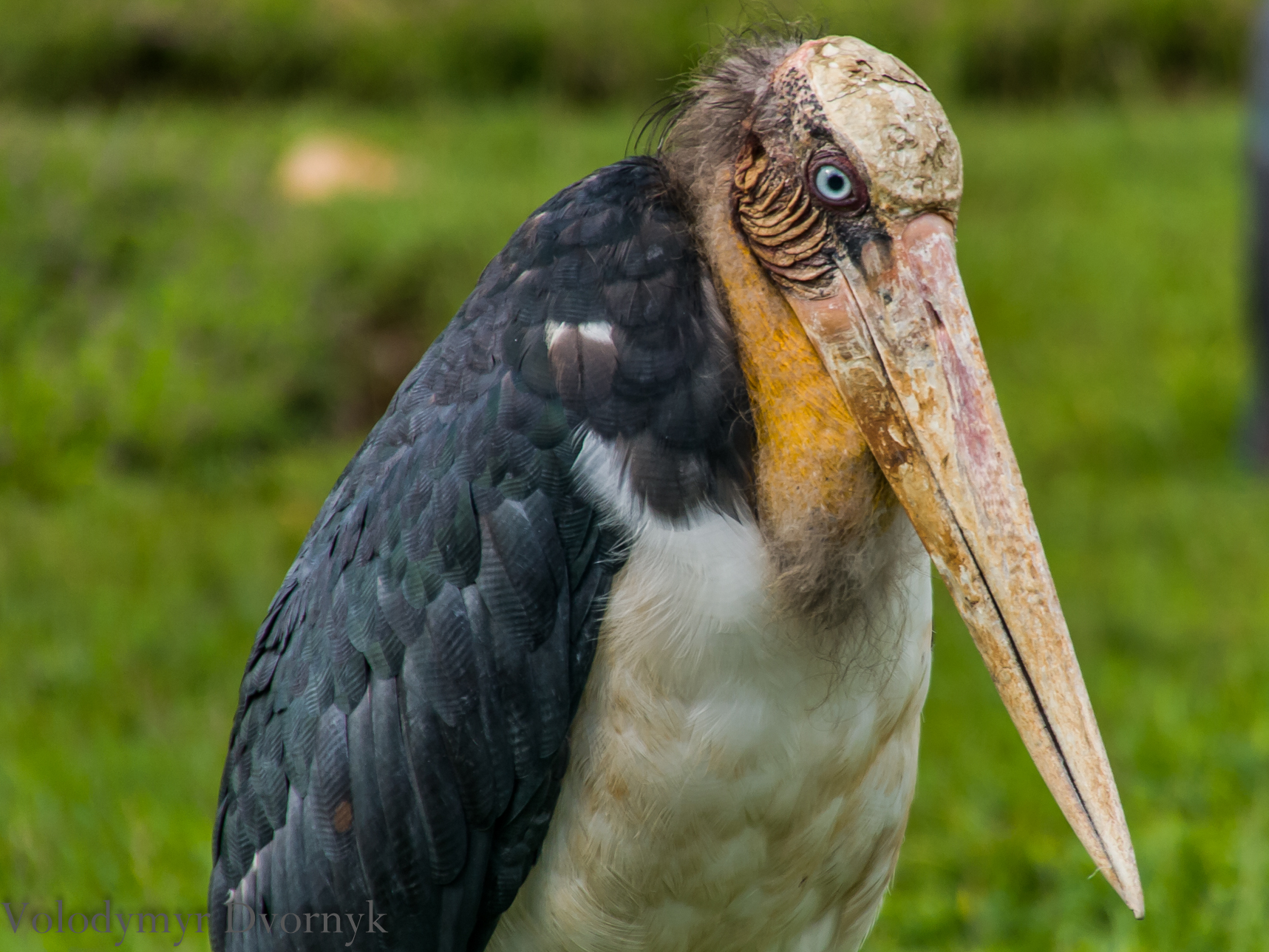 Яванский марабу (Leptoptilos javanicus) крупным планом